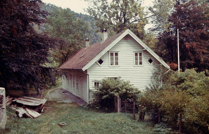 Hovedbygningen på Lavik prestegård. Foto: Ina Backer. Fra Riksantikvarens Kulturminnesøk.